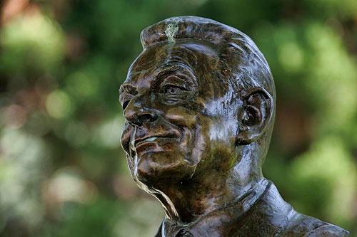 Lausanne: alt Bundesrat J.-P. Delamuraz à Ouchy